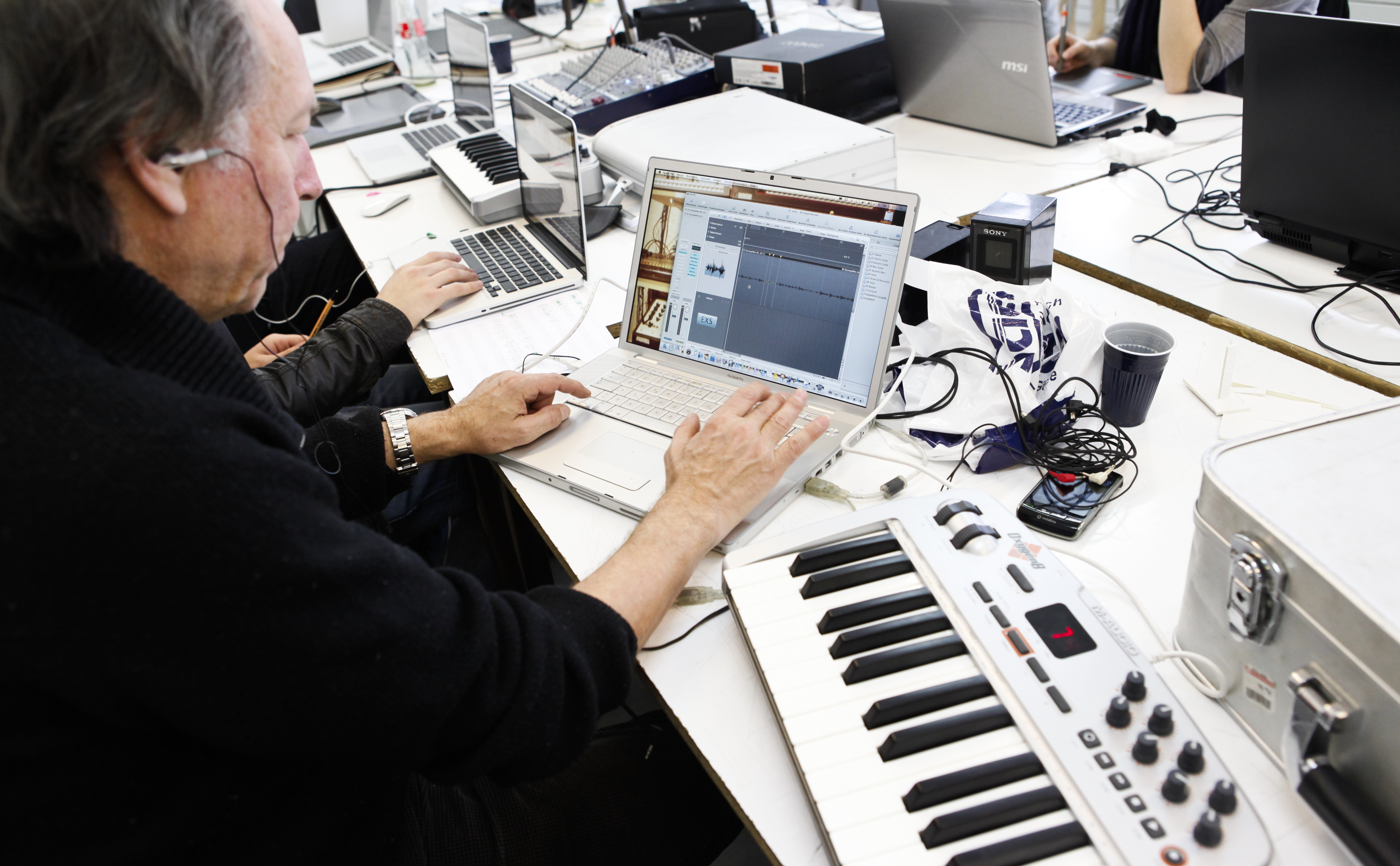 Bild aus den Werkstattwochen der Hochschule für Kunst, Design und Populäre Musik in Freiburg im Breisgau